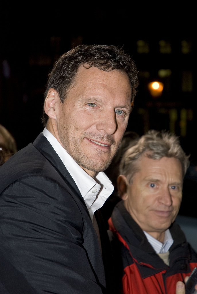 Ralf Möller, Volkswagen People’s Night